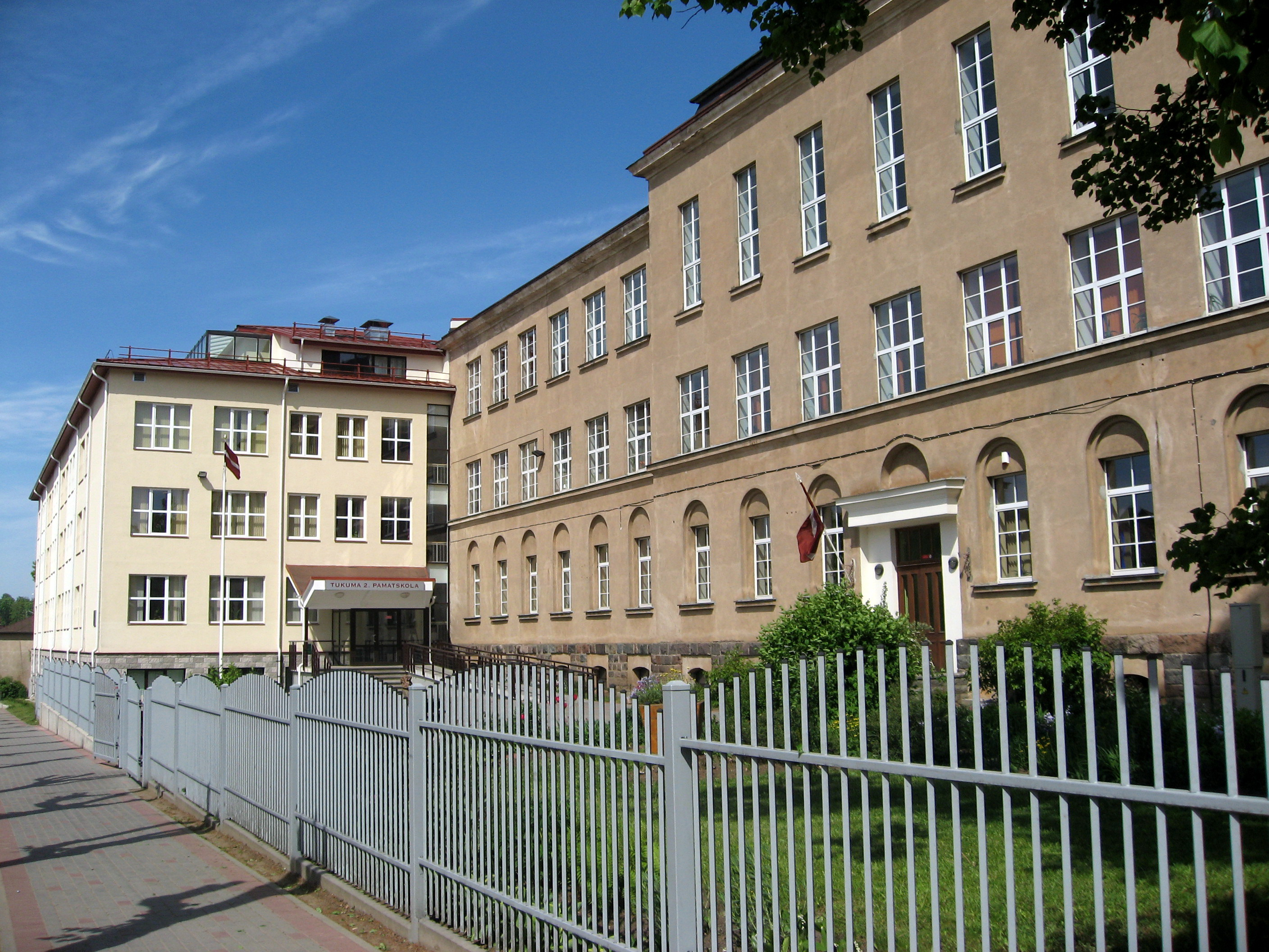 Tukums